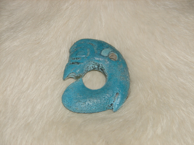 三星堆文化-年代約4800至2200年。 三星堆文化-小件配飾品.有數百種的造形.玉牙璋.玉琰.玉刀.玉鏟.魚牙璋.Ｃ形龍斧鋤器.猪龍斧鋤器.﹝玉梟.玉鷹斧鋤器﹞.面具.異形獸斧鋤器.玉蟬複合體等。 此器質化晶變‧次晶增生未受人工拋光打磨、 保留原有風化.、生坑未盤玩，造形特別‧曲線流暢.雕工傳神‧創意佳。 ﹝藝術品﹞